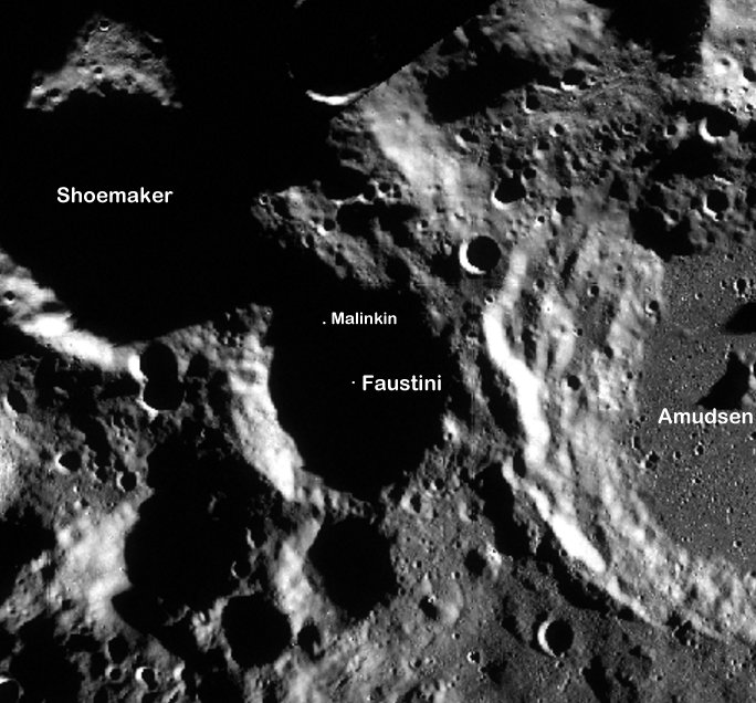 Cráter lunar Faustini. (Imagen LROC)